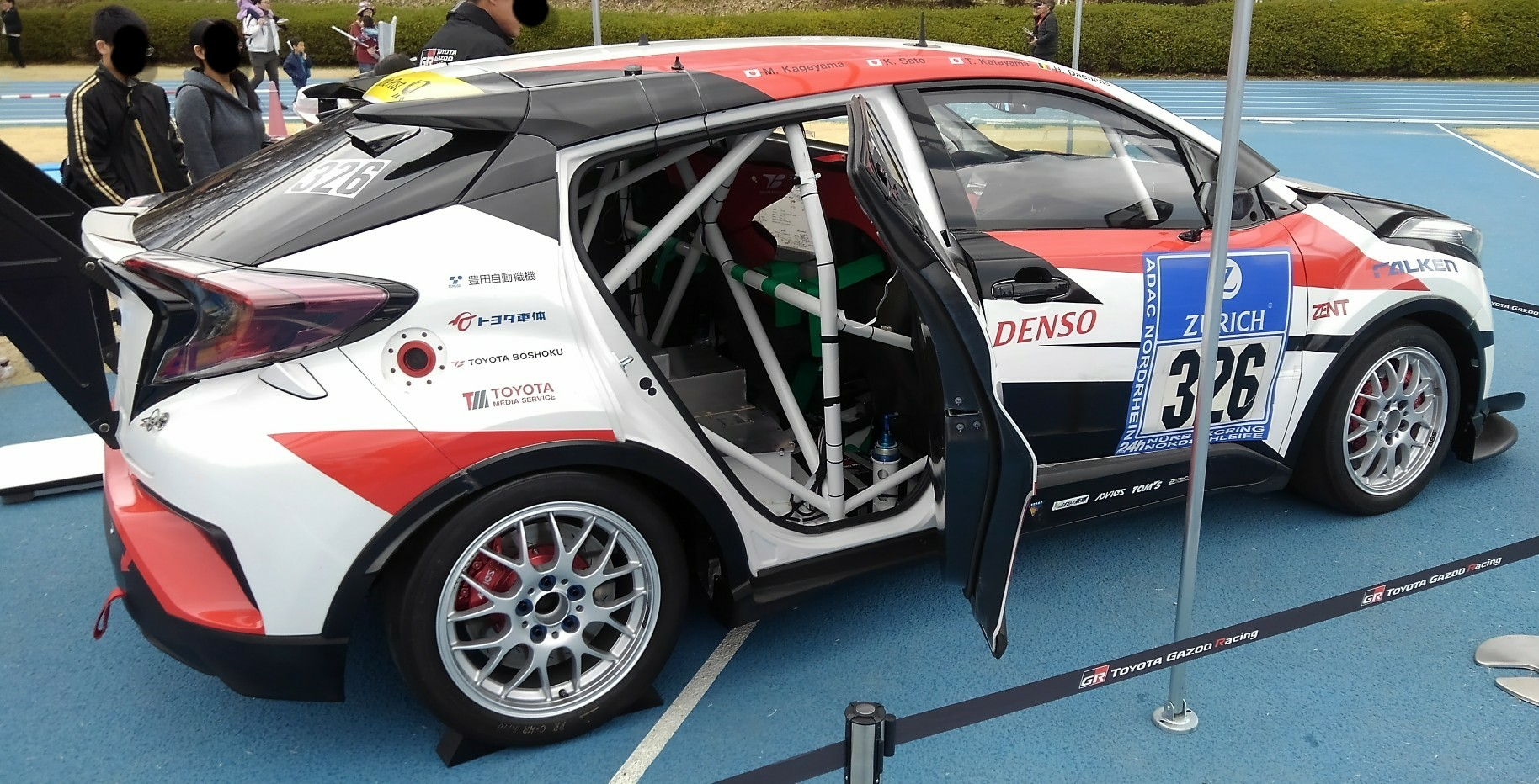 C-HR Racingのロールバー。